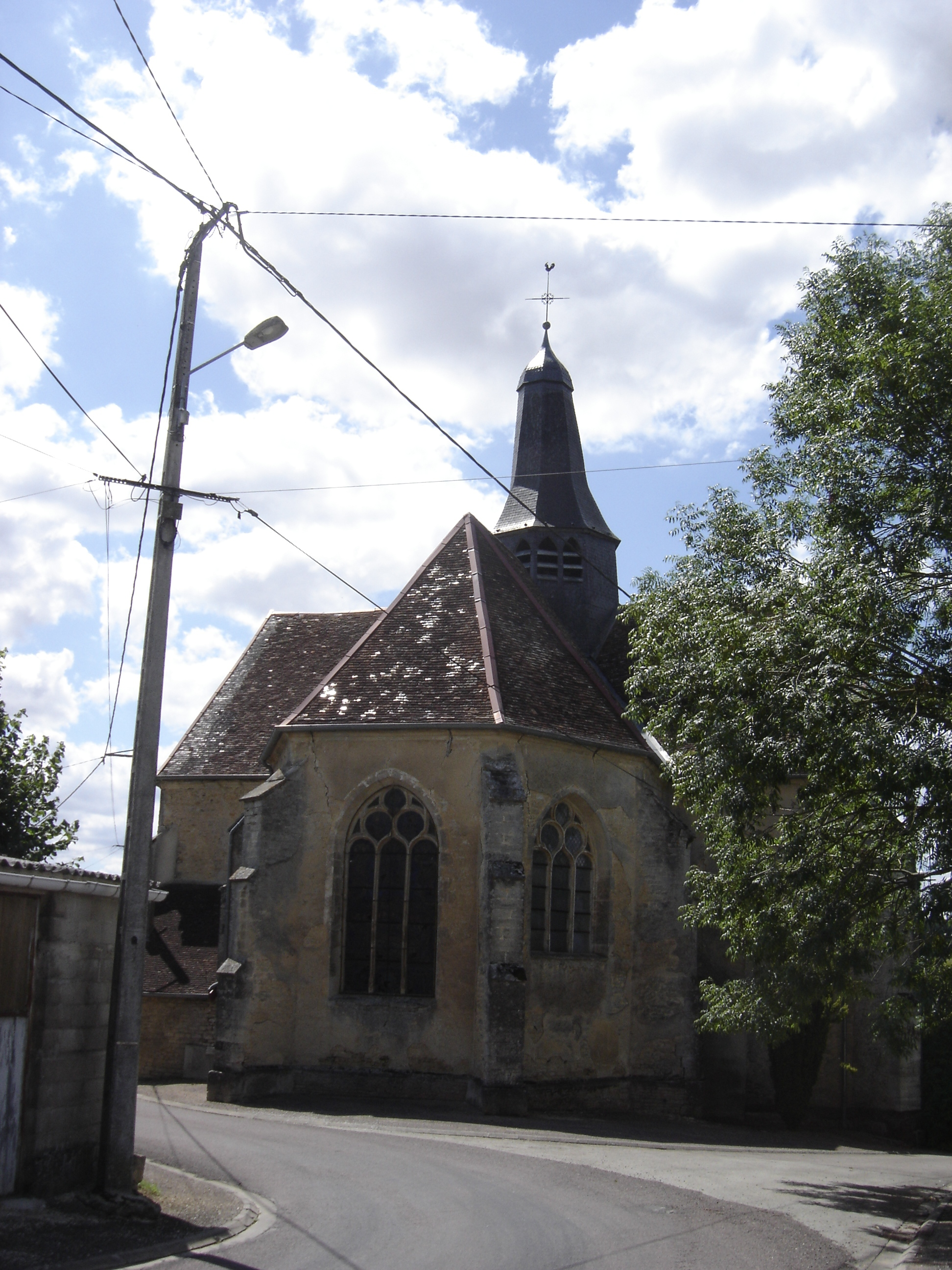 église de l'Assomption de la Sainte Vierge du Puits - Aube - France